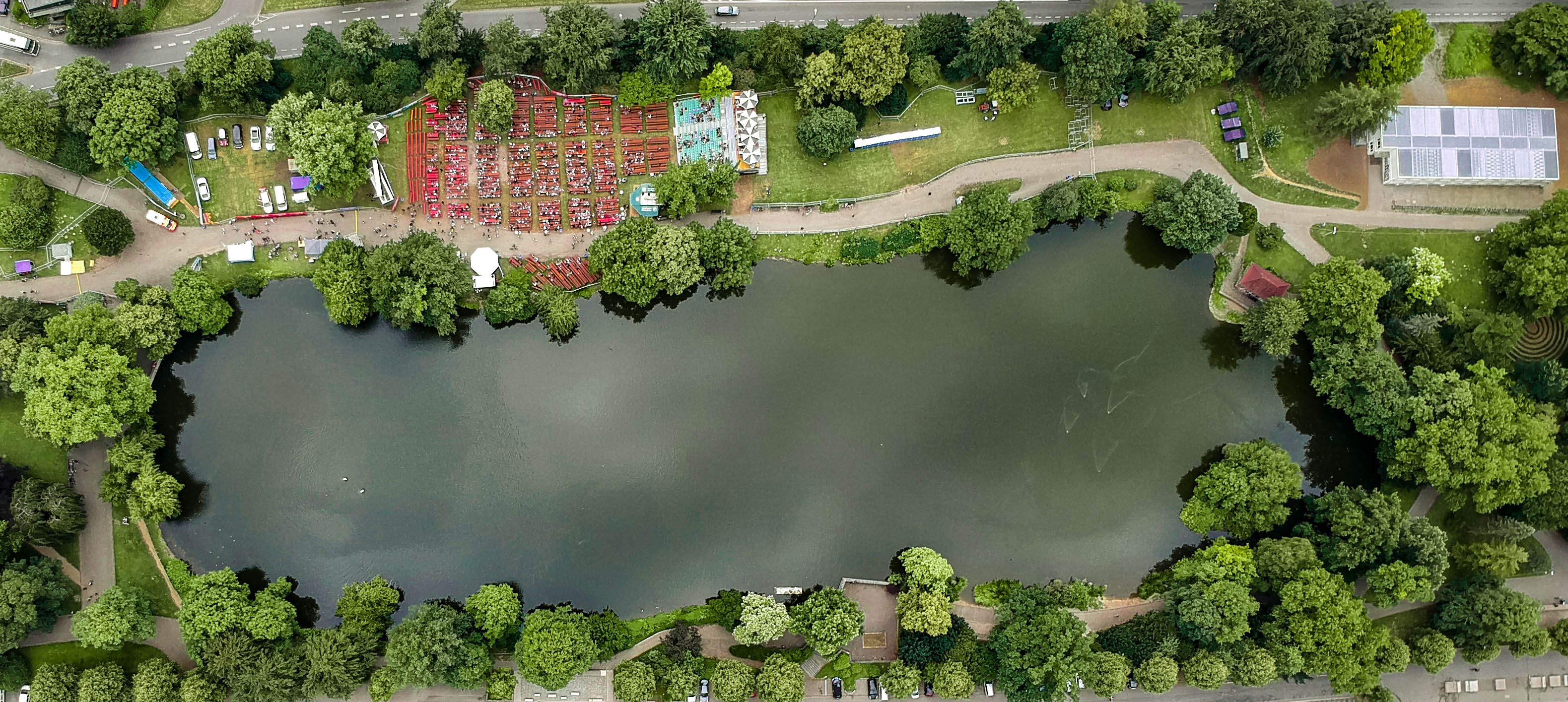 Tübingen. Teich in den Städtischen Anlagen aus der Luft.JPG